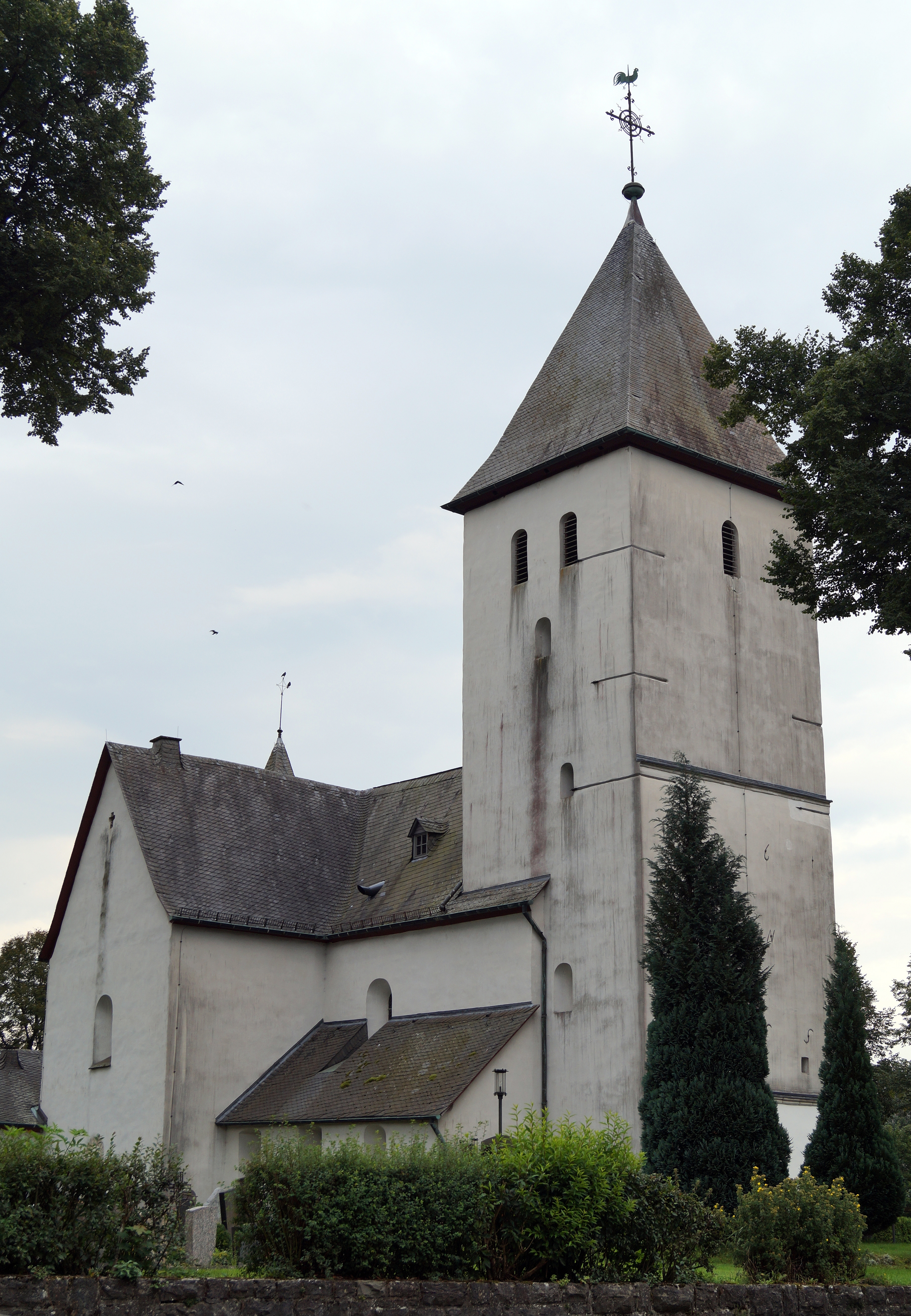 Schmallenberg-Berghausen, denkmalgeschützte Pfarrkirche St. Cyriakus um 1200 bis 1220 im romanischen Stil erbaut. Eine der ältesten erhaltenen Kirchen im Hochsauerlandkreis. Die Fresken gelten als Meisterwerk mittelalterlicher Kunst im Sauerland. This is a photograph of an architectural monument.